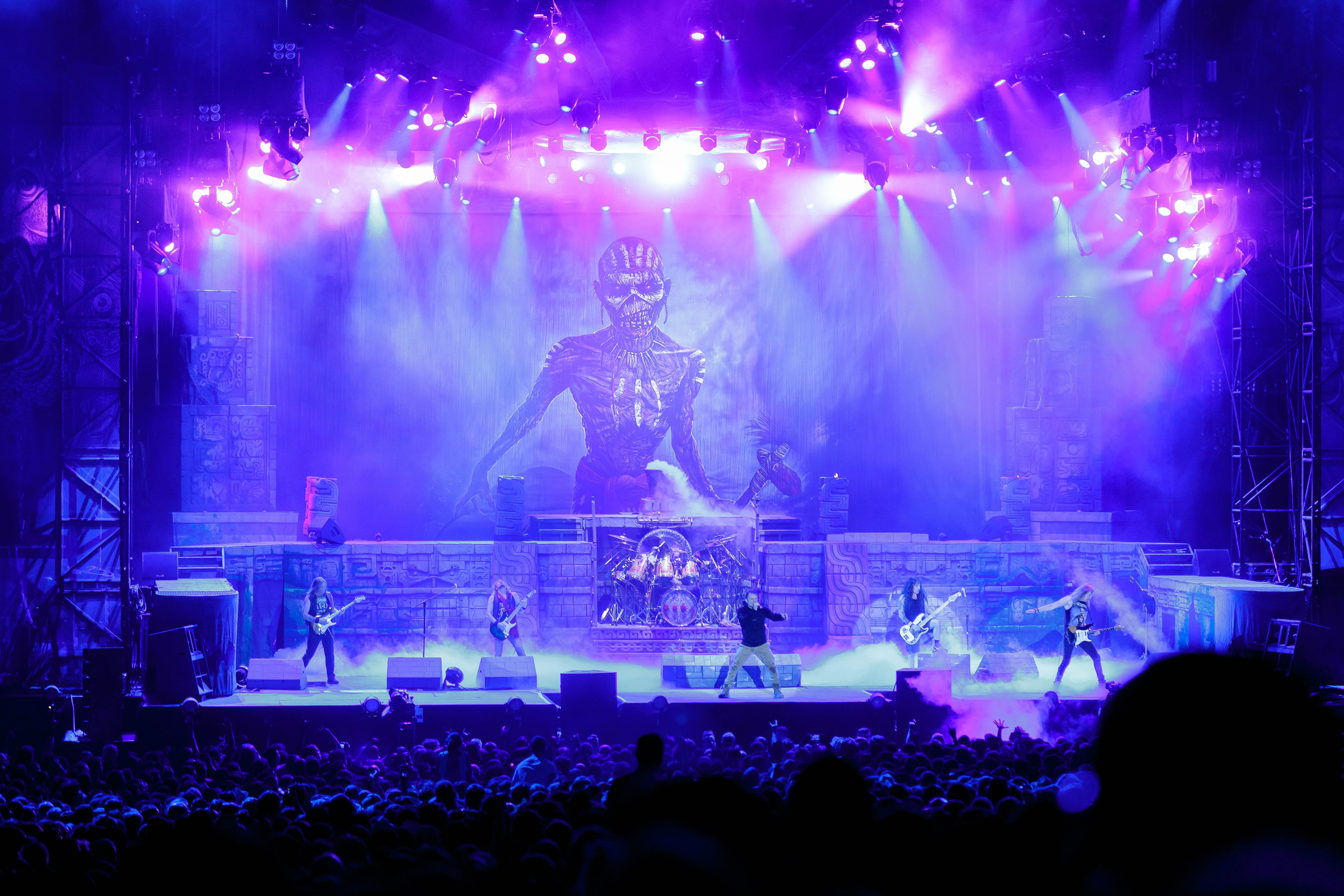 Paléo Festival Nyon, édition 2016, 19-24 juillet 2016. Mercredi 20: Iron Maiden (heavy-metal, Grande-Bretagne)